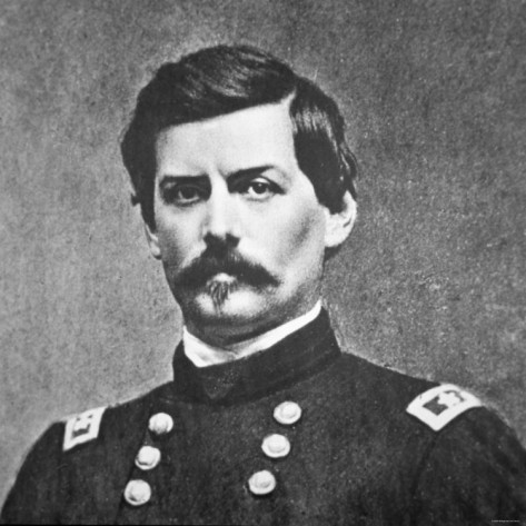 портрет генерала Џорџа Маклелана